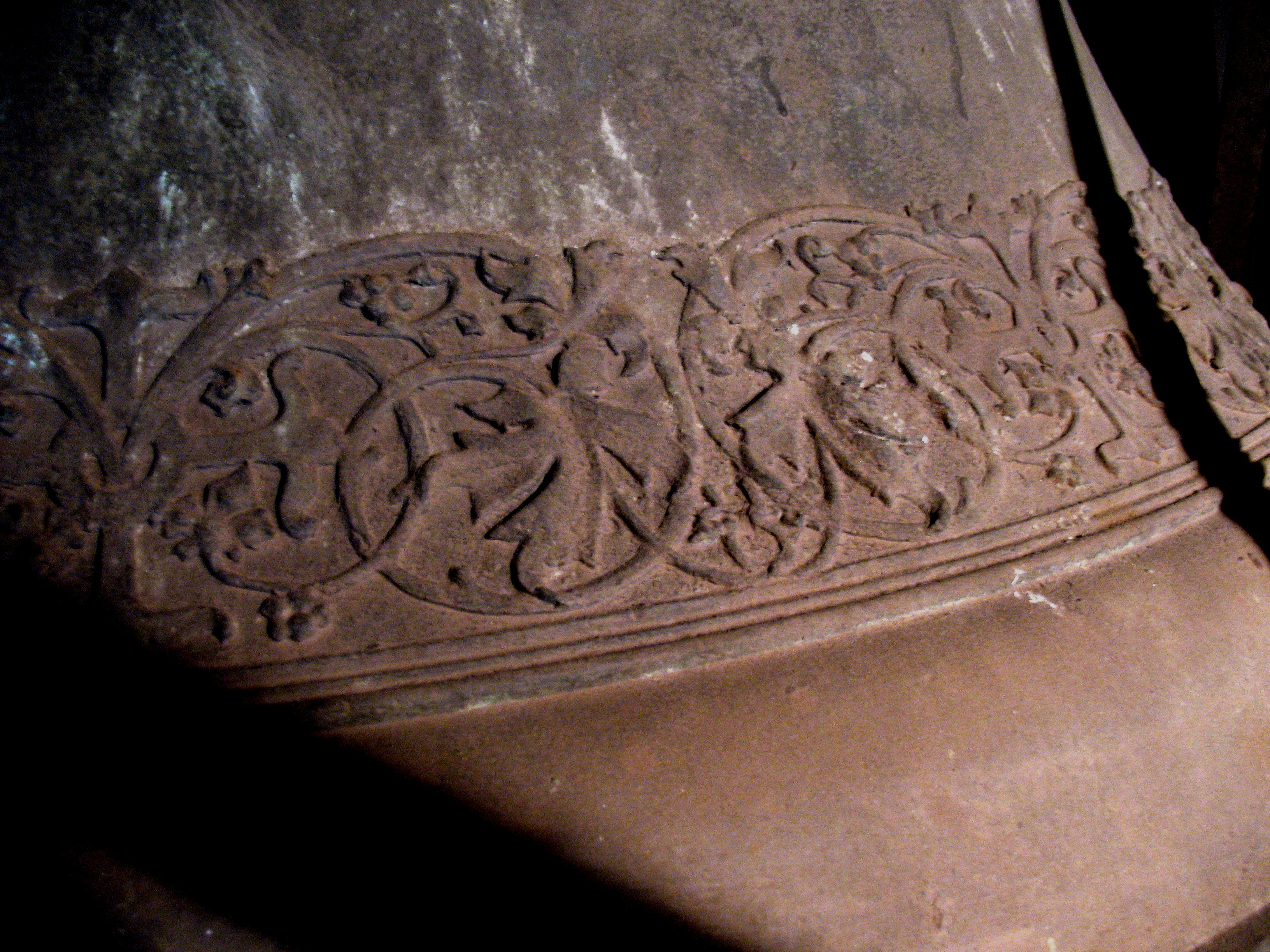 Glocke II des ehemaligen Bronzegeläutes von G. A. Jauck (Leipzig). Nominal: d'. Détail: umlaufender Fries aus Ornamenten, welche das Kreuzsymbol sowie Voluten mit Weinlaub und -trauben darstellen.